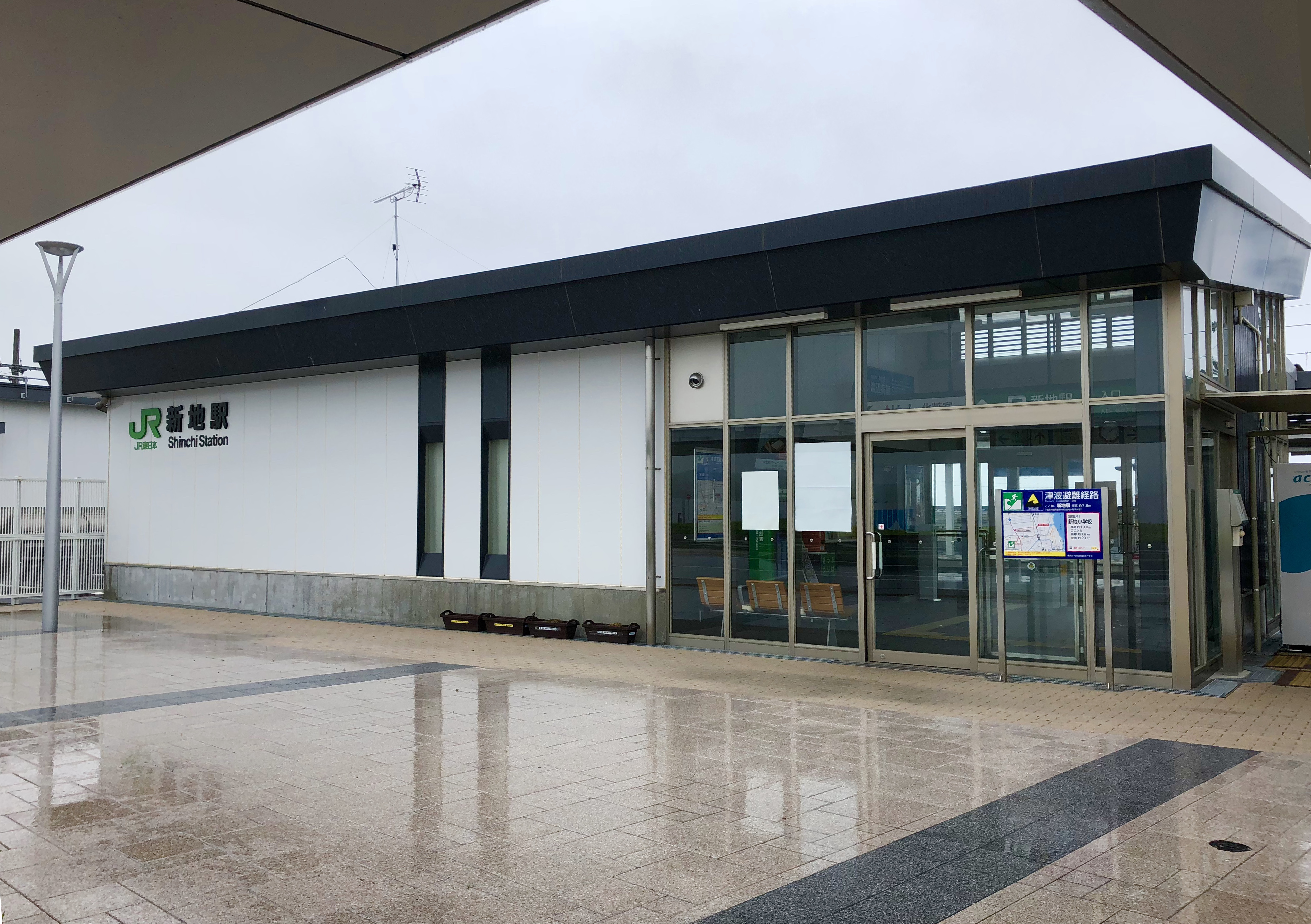 新地駅正面